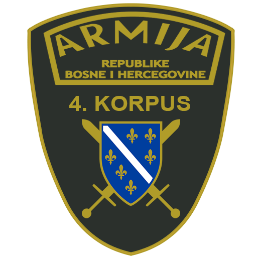 Četvrti korpus korpus armije republike Bosne i Hercegovine